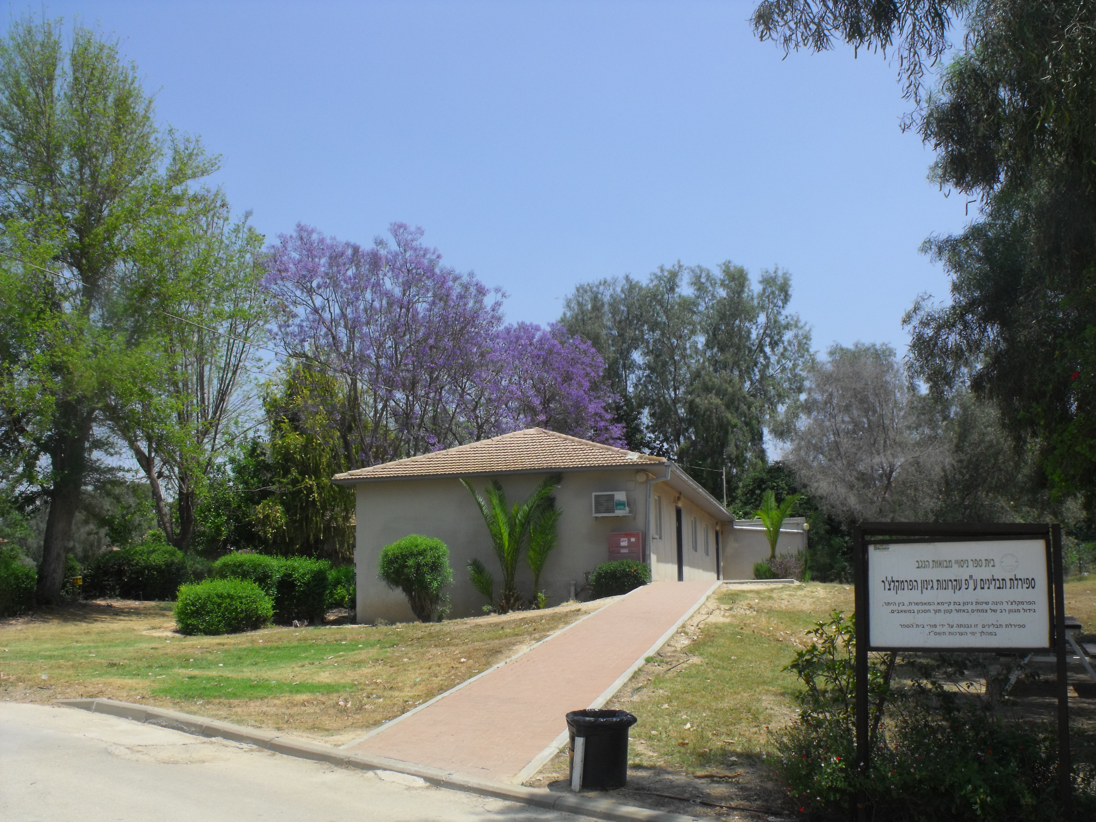 מבנה בבית הספר וספירלת התבלינים